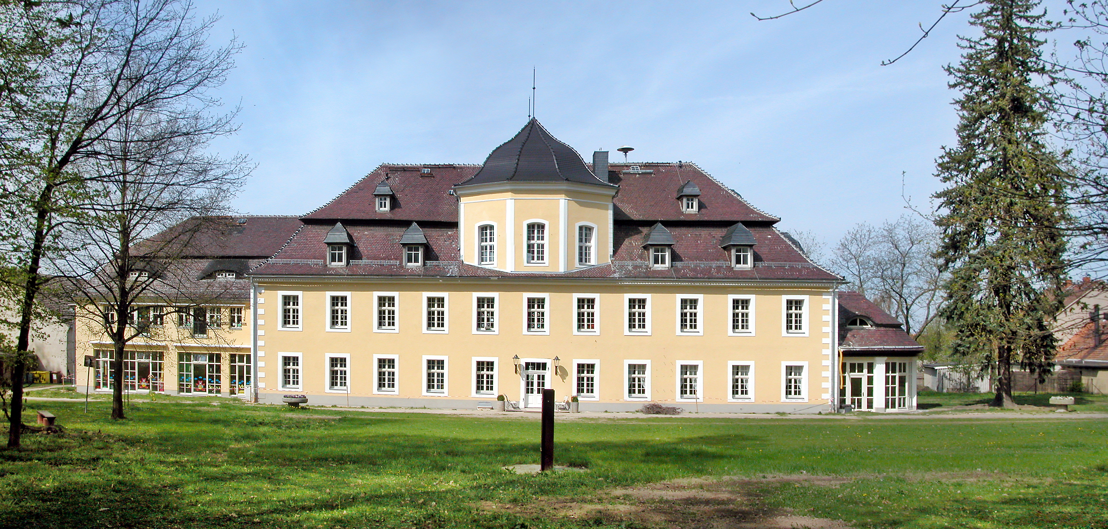 28.04.2008 02708 Kittlitz (Löbau), Ringstraße 1 (GMP: 51.131944,14.672880): Schloß Kittlitz, vermtl. in der 1. Hälfte des 18 Jh. erbaut. Seit DDR-Zeiten wird das Schloß als Kindergarten, Kinderkrippe, Standesamt, Gemeindeschwesternstation und für Wohnungen genutzt. Der Heimat- und Schloßverein Kittlitz, dessen Mitglieder die Sanierung des Hauses selbst mit betrieben haben, nutzt eine Teilfläche als "Haus der Vereine" für Kulturveranstaltungen. Parkseite. [DSCN32561-32561.TIF]20080428605MDR.JPG(c)Blobelt